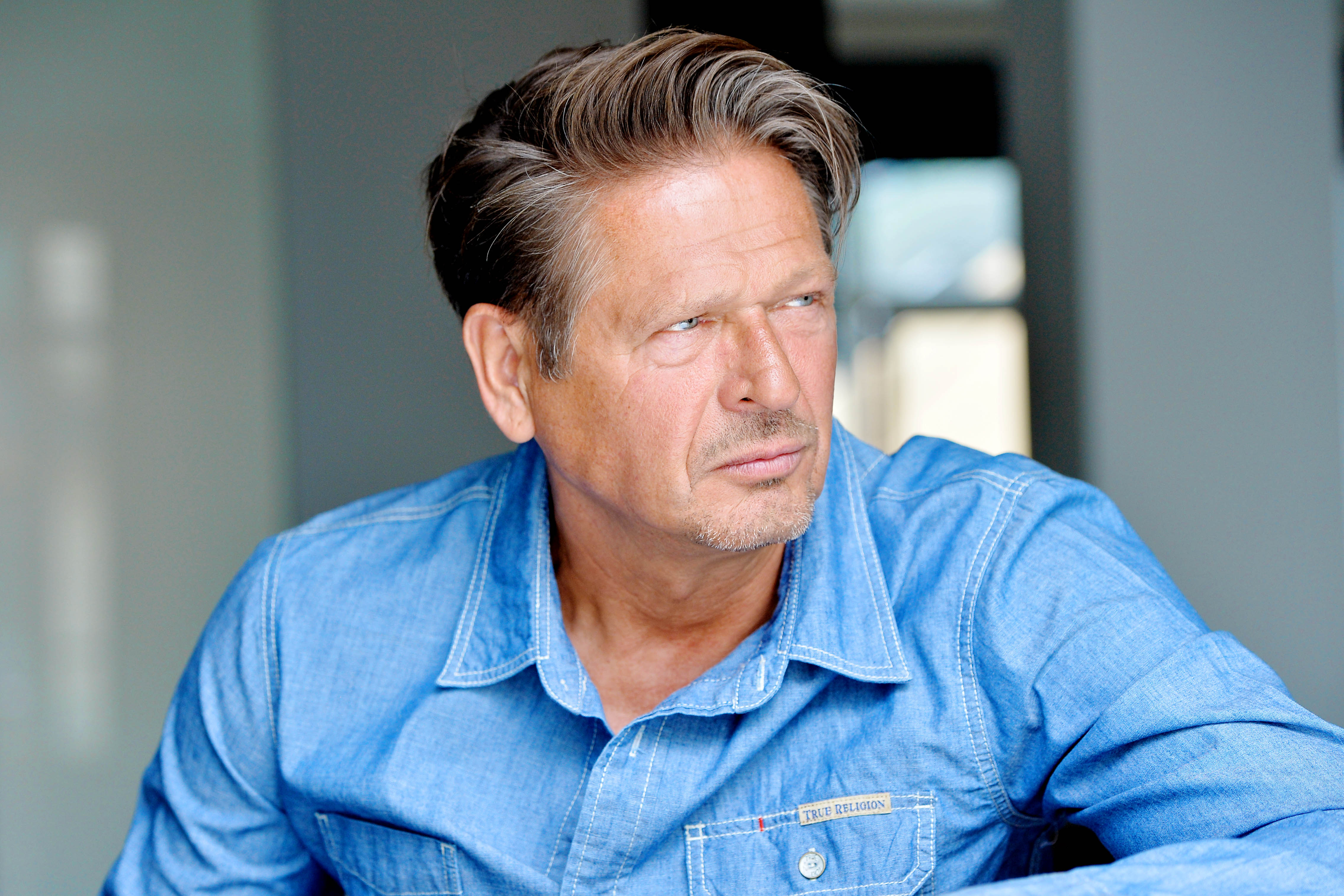 Joshy Peters Picture by Björn Kommerell